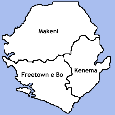 Mappa delle diocesi cattoliche della Sierra Leone. Lavoro Personale eseguito a partire da questa immagine di Commons. Fonte per i confini delle diocesi: Guida delle missioni cattoliche 2005, a cura della Congregatio pro gentium evangelizatione, Roma, Urbaniana University Press, 2005. Categoria:Chiesa cattolica in Sierra Leone